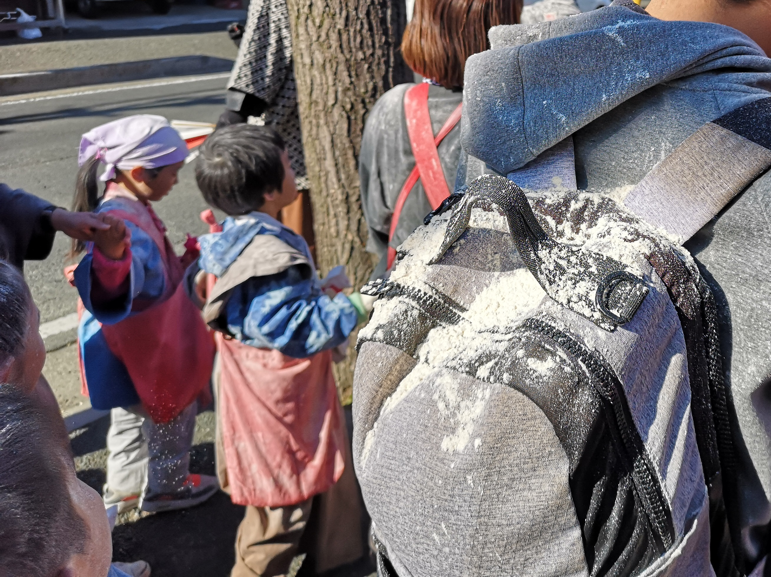 豊橋鬼祭 門寄りで飴粉を被った観客